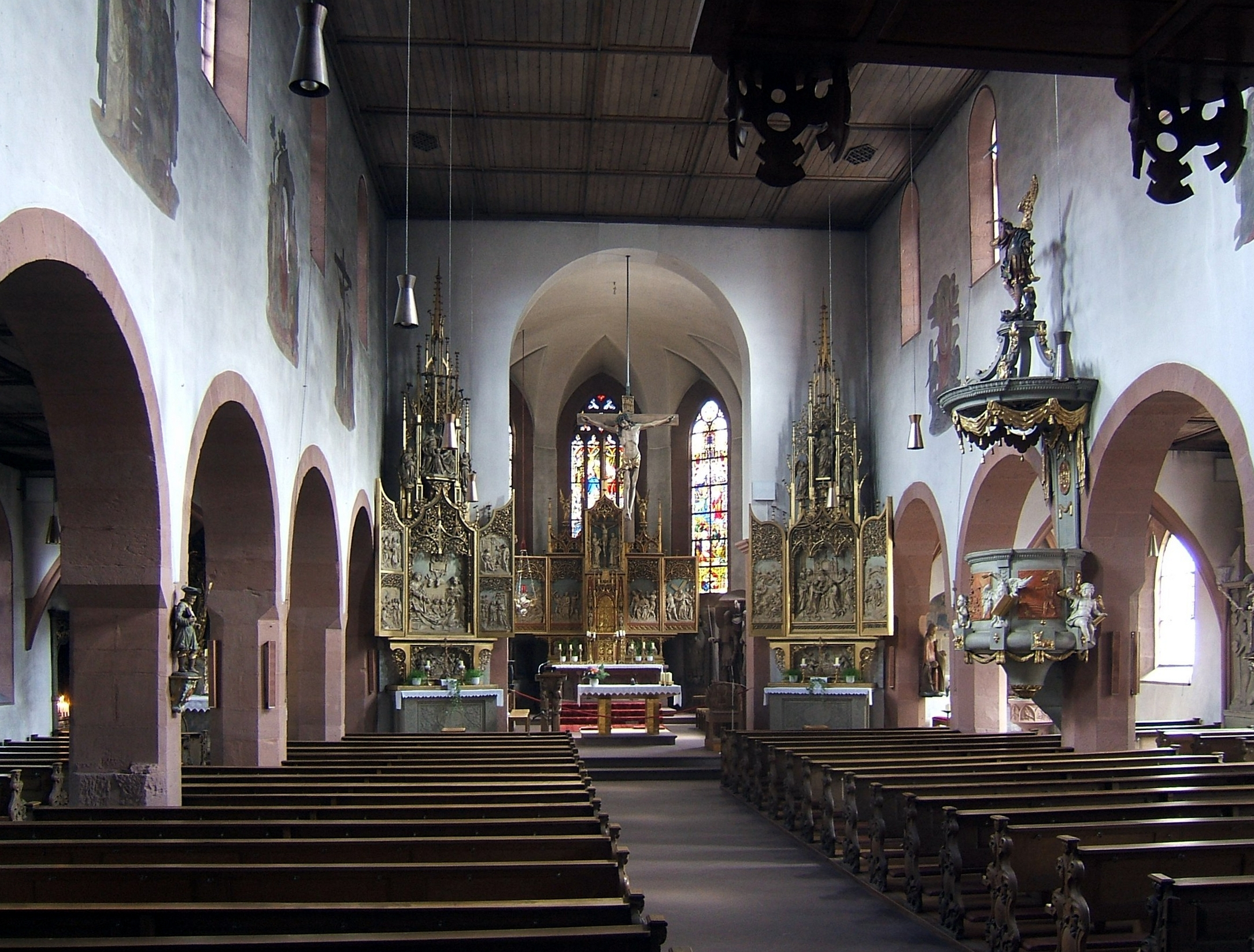 Kirchenschiff der St. Michaelskirche in Lohr.